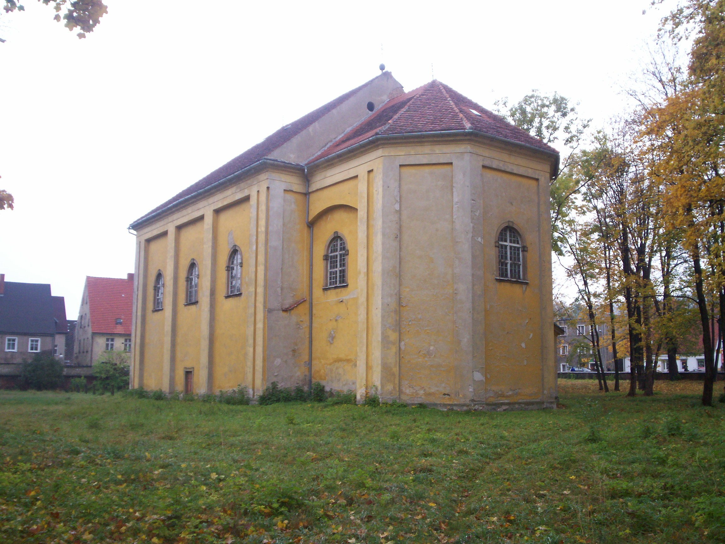 Polska. Powiat Kamienna Góra, miasto Lubawka, kościół św. Anny.